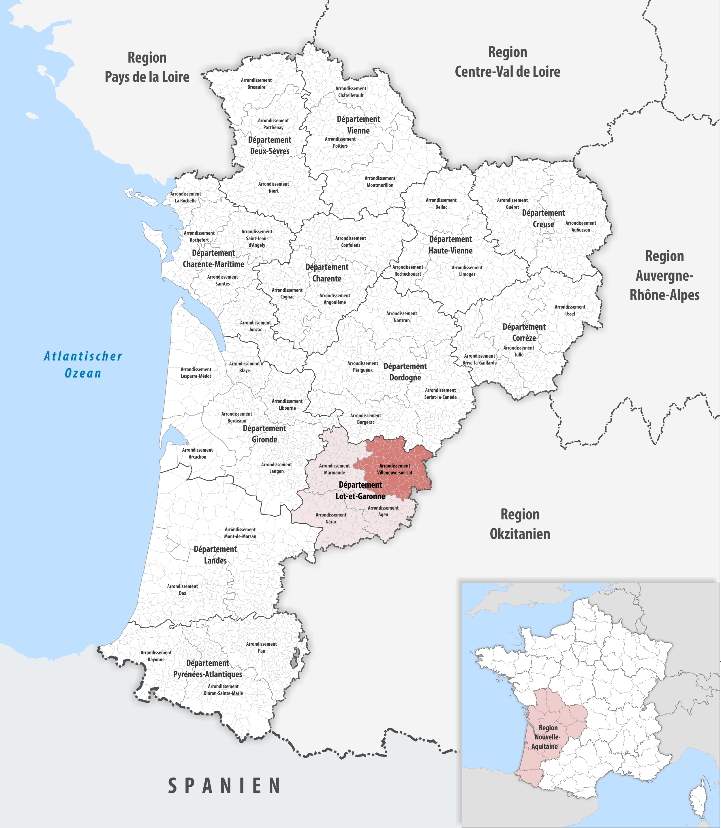 Lage des Arrondissements Villeneuve-sur-Lot